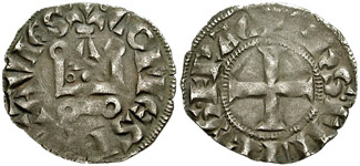 France, Provincial. Poitou. Philippe de France (as "comte de Poitou", later king Philippe V de France. 1311-1316. Billon Denier (18mm, 0.84 gm). +PhILIPPVS COMES, cross cantonnée PIETAVIENSIS, demi lis and arms of Castille. Poey d'Avant 2598. Toned VF